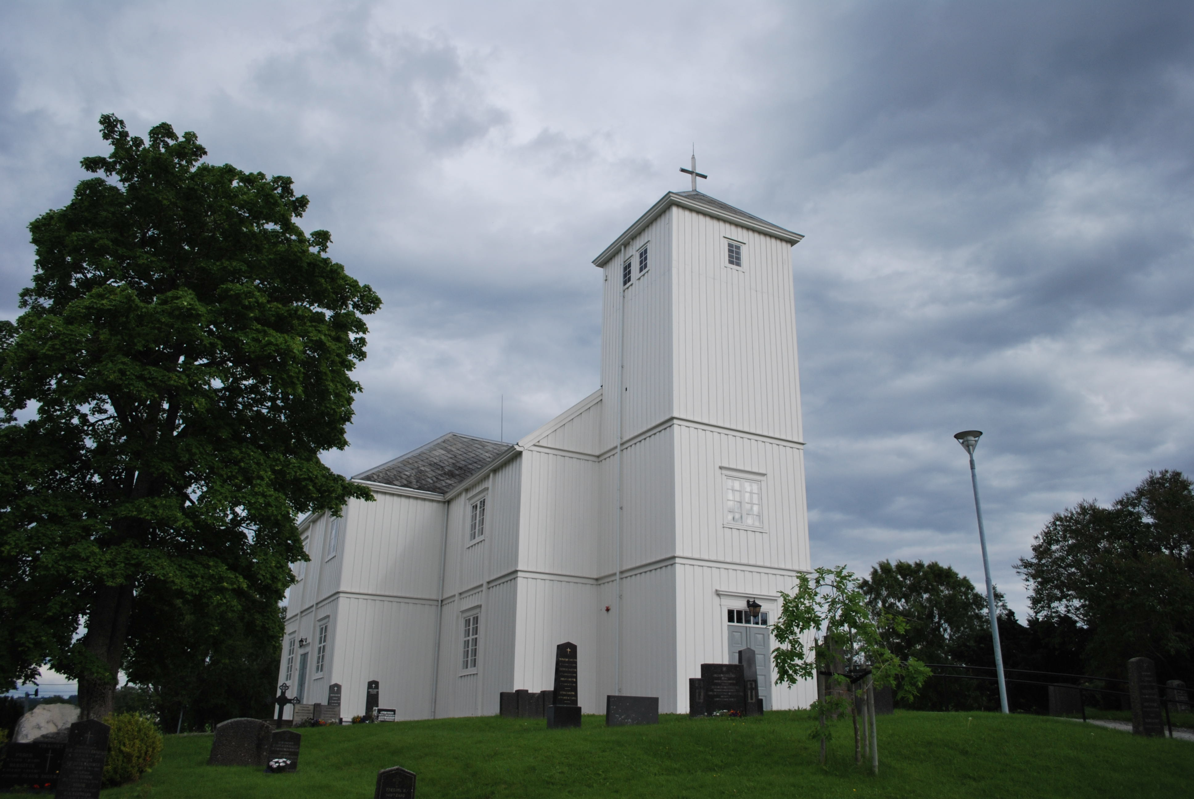 Malvik kirke i Malvik kommune i Sør-Trøndelag fylke.